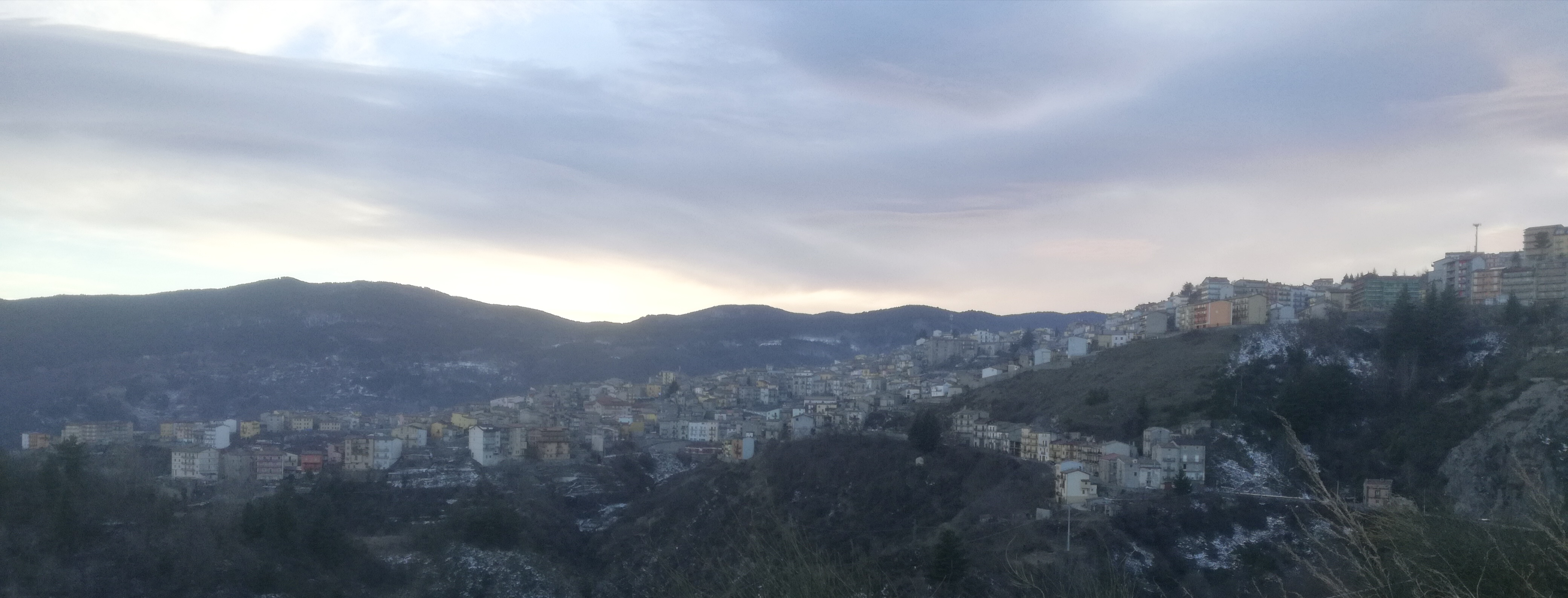 Panorama di San Giovanni in Fiore